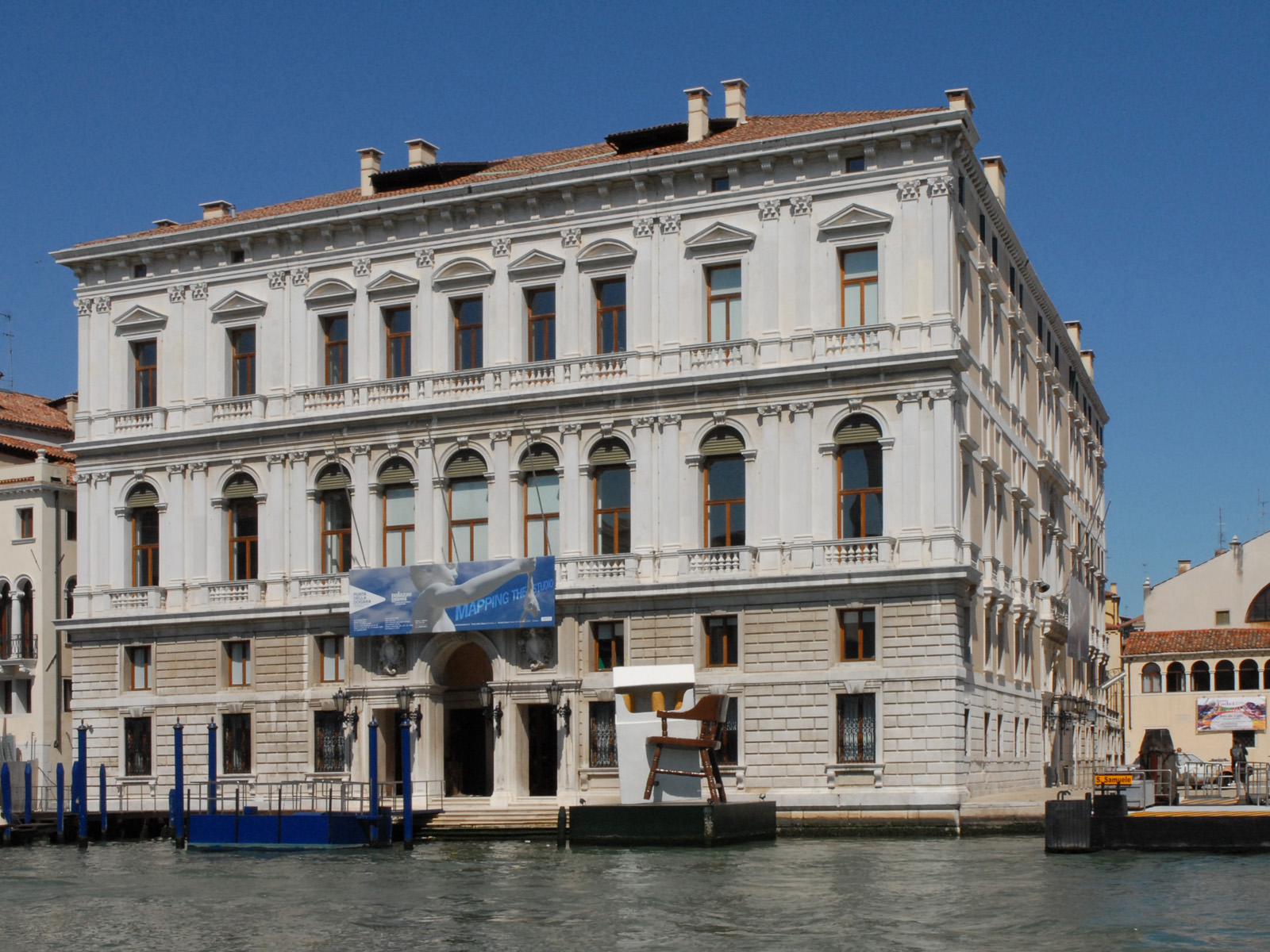 Le palazzo Grassi a été aménagé par l'architecte japonais Tadao Ando à la demande de François Pinault pour accueillir sa collection d'art contemporain. Le bâtiment possède 40 salles, sa surface est de 5.000 m2. Il a été inauguré en avril 2006. Une oeuvre de Urs Fisher intitulée "Bad Timing Lamb Chop" (2004-2005) est placée devant le bâtiment sur le grand canal. Cette oeuvre fait partie de l'exposition intitulée "Mapping the studio" voir le commentaire de l'exposition à la Punta della Dogana Le palazzo Grassi a été construit dans le style néo-classique, au début du XVIIIème siècle, pour la famille Grassi par Giorgio Massari. Dès 1830, il a changé de propriétaires plusieurs fois parmi lesquels figure la société FIAT en 1984. Les architectes : Gae Aulenti et Antonio Foscari l'ont restauré pour lui permettre d'accueillir des expositions, tout en respectant son caractère.